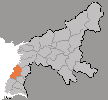 Map of Jungsan, Pyongan-namdo, DPRK, 2006